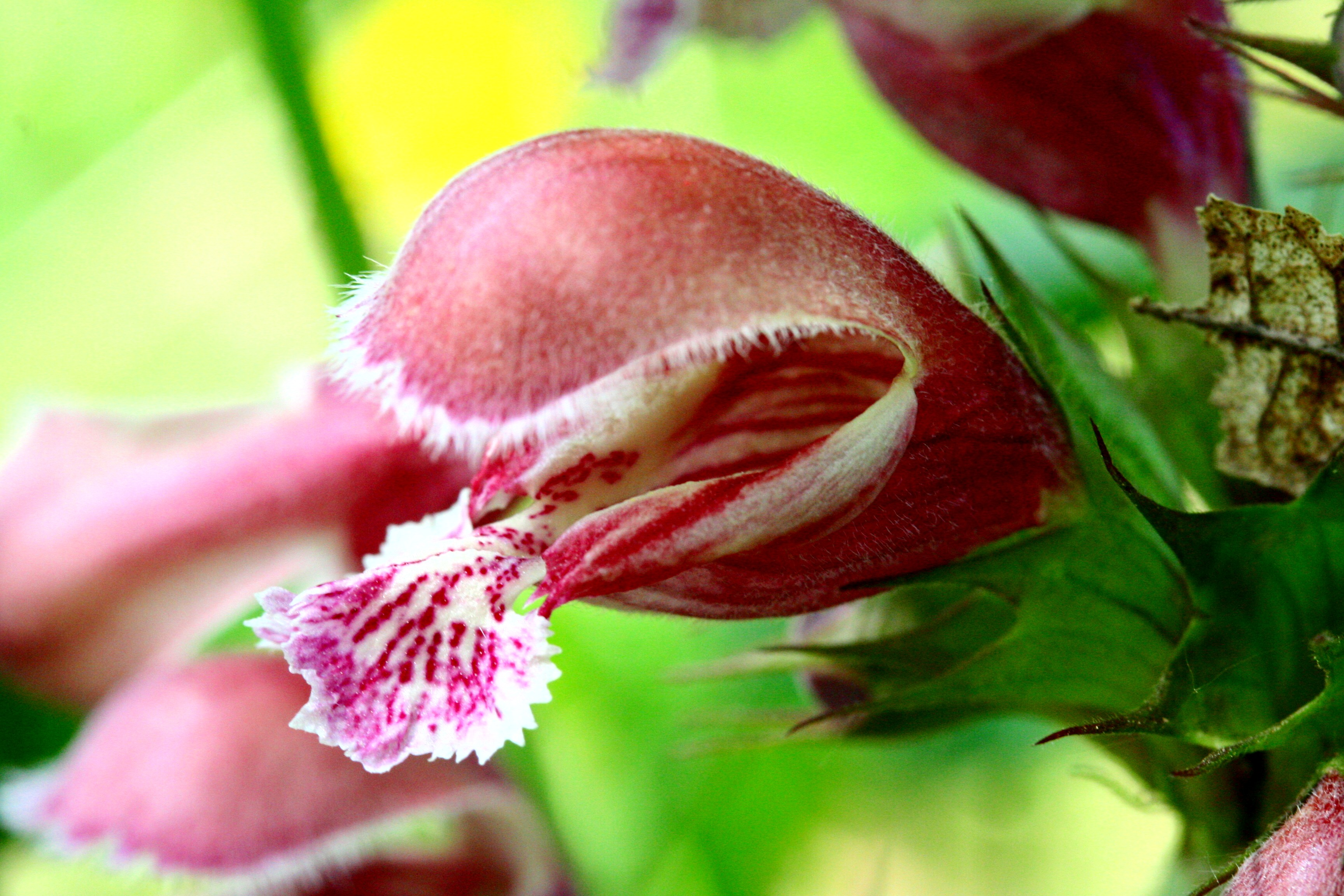 Falsa ortica maggiore - Località : Pasa, Sedico (BL), 356 m s.l.m.